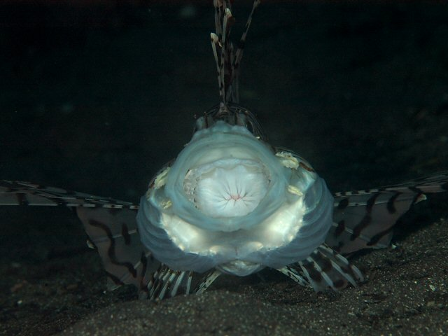 ミノカサゴ Pterois lunulata